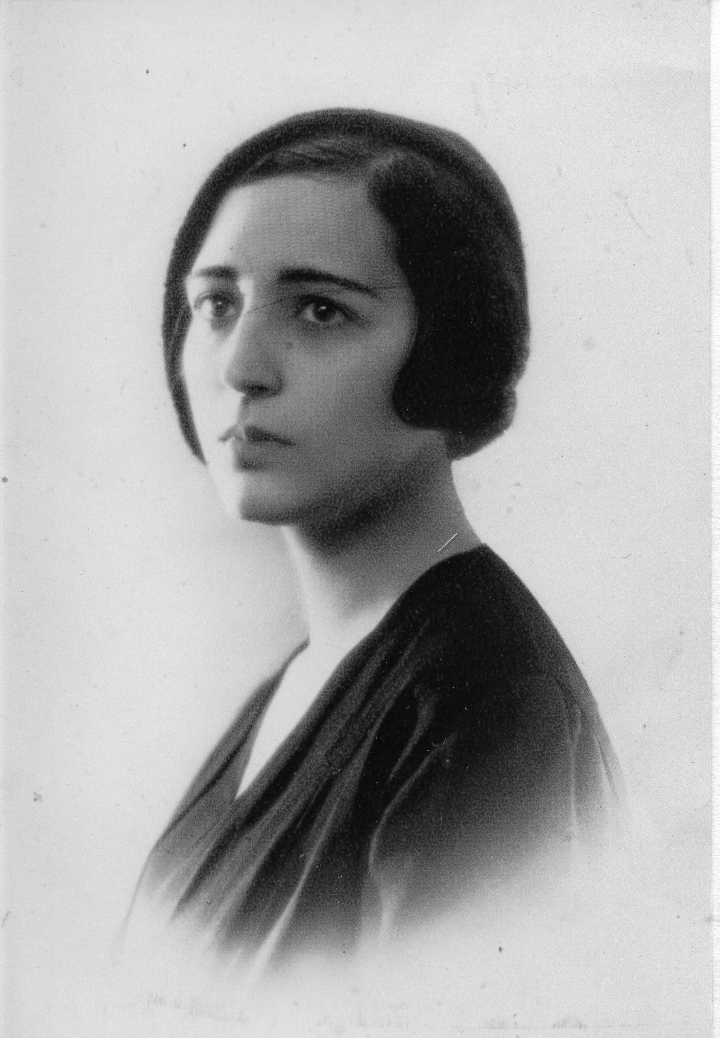 Susana Calandrelli, Argentine poet & writer